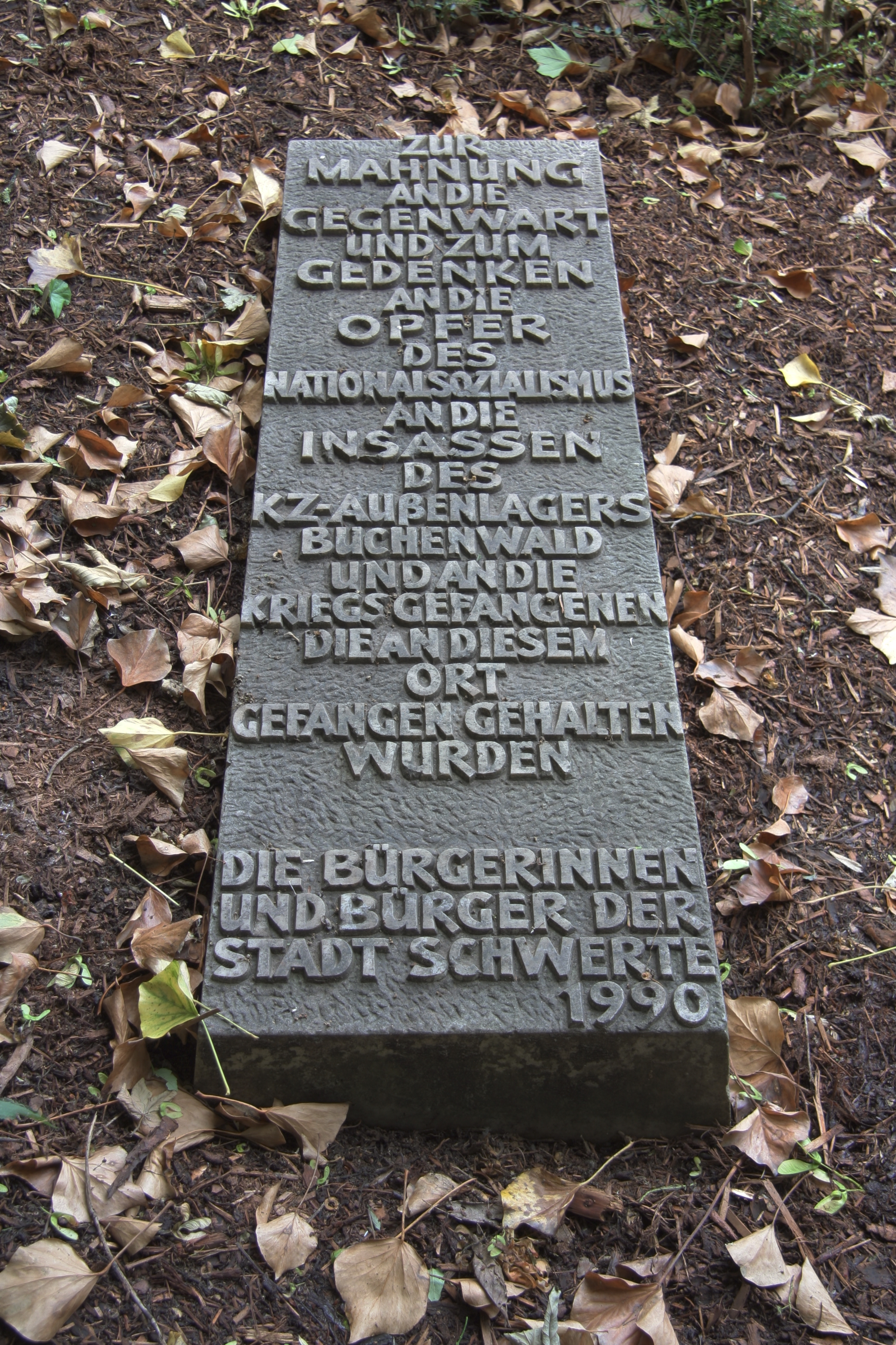 Gedenktafel in der Gedenkstätte des ehemaligen Arbeitslagers Schwerte-Ost